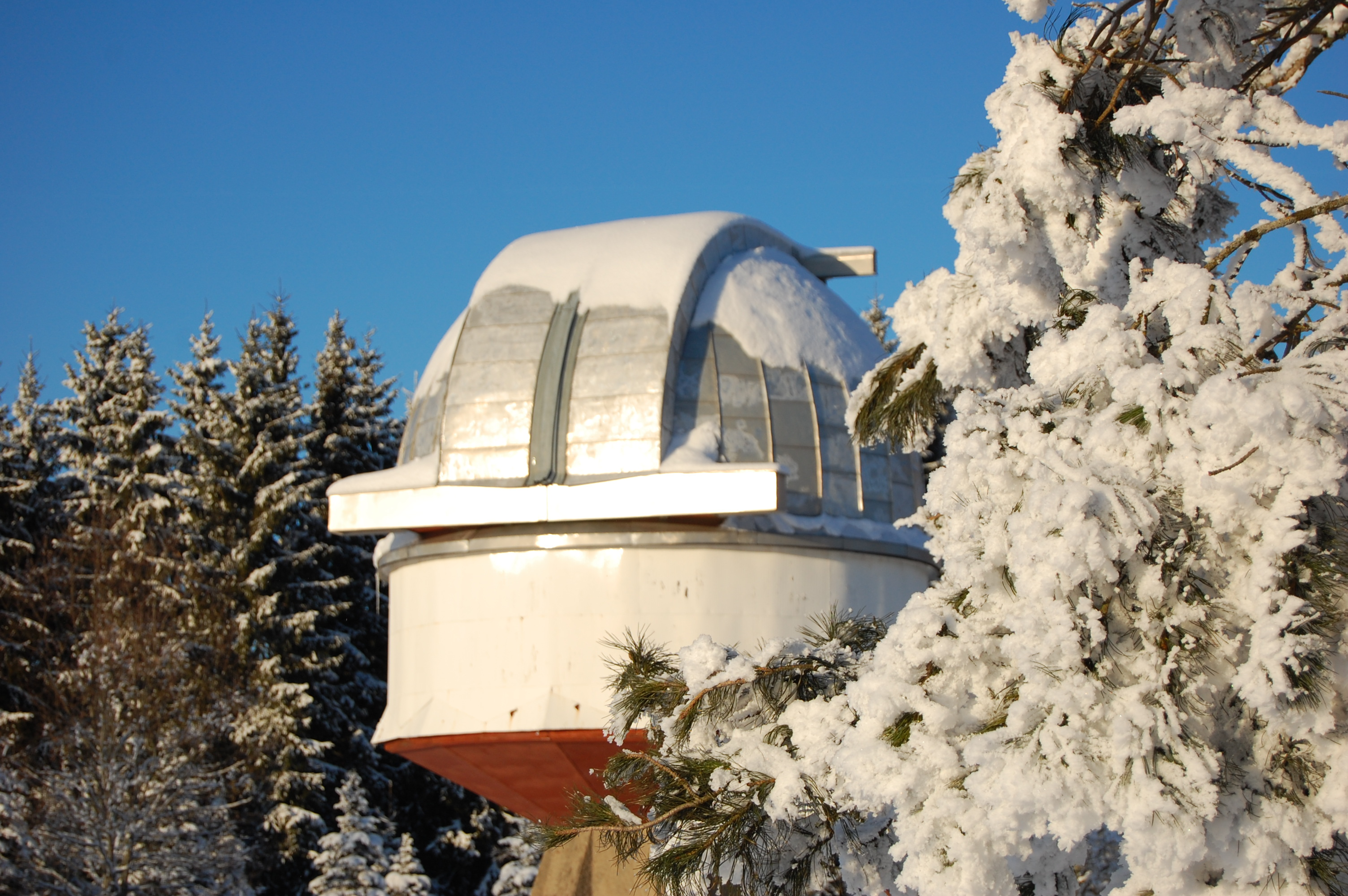 60cm teleskoobitorn Tartu Observatooriumis